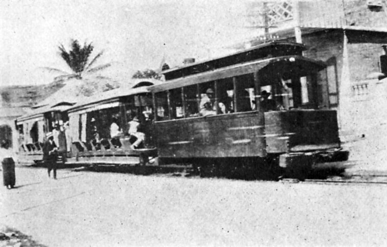 transport public ferroviaire pour Léogâne (Haïti)